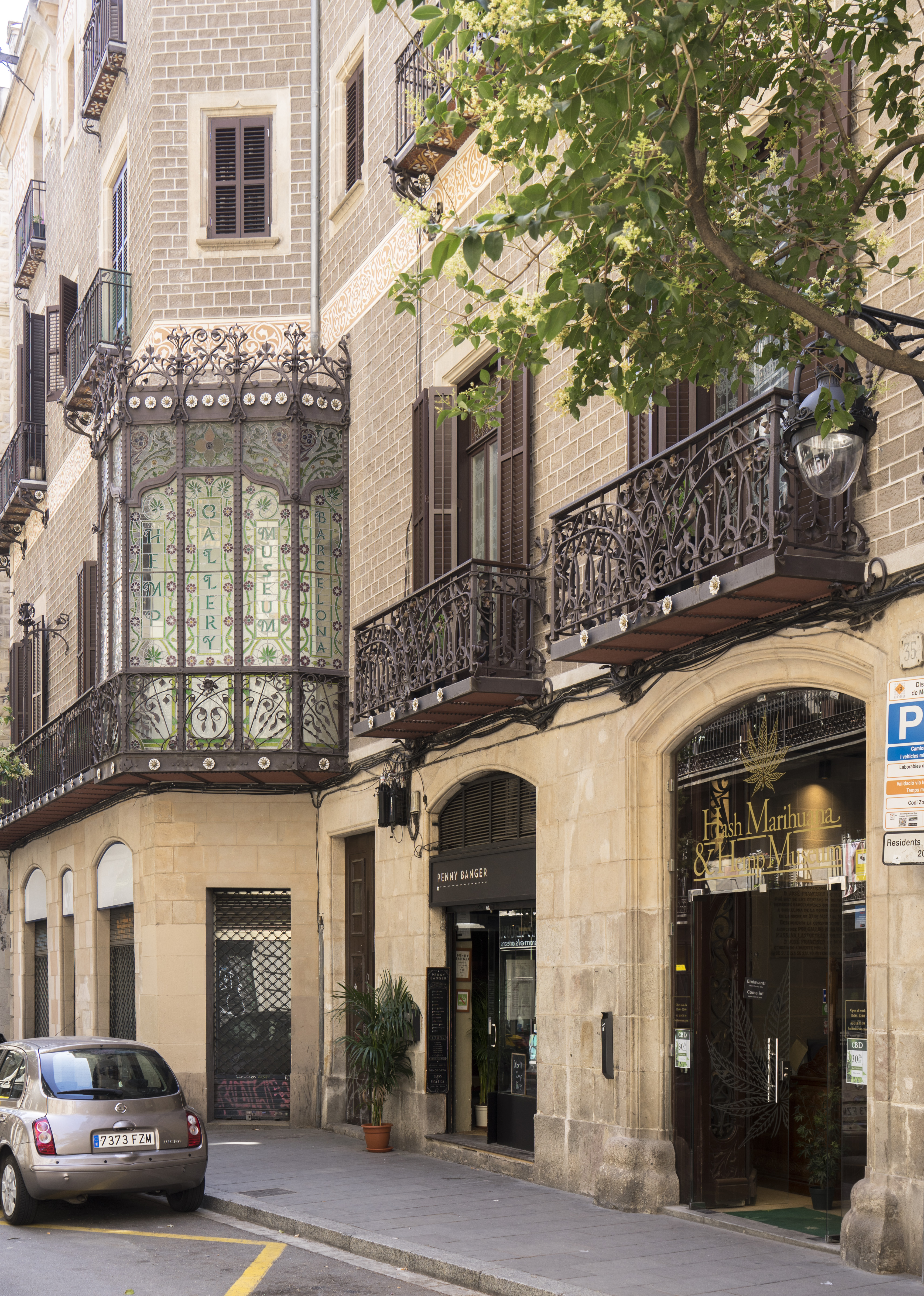 Palais Mornau, Hemp Museum, Art Nouveau, Barcelona